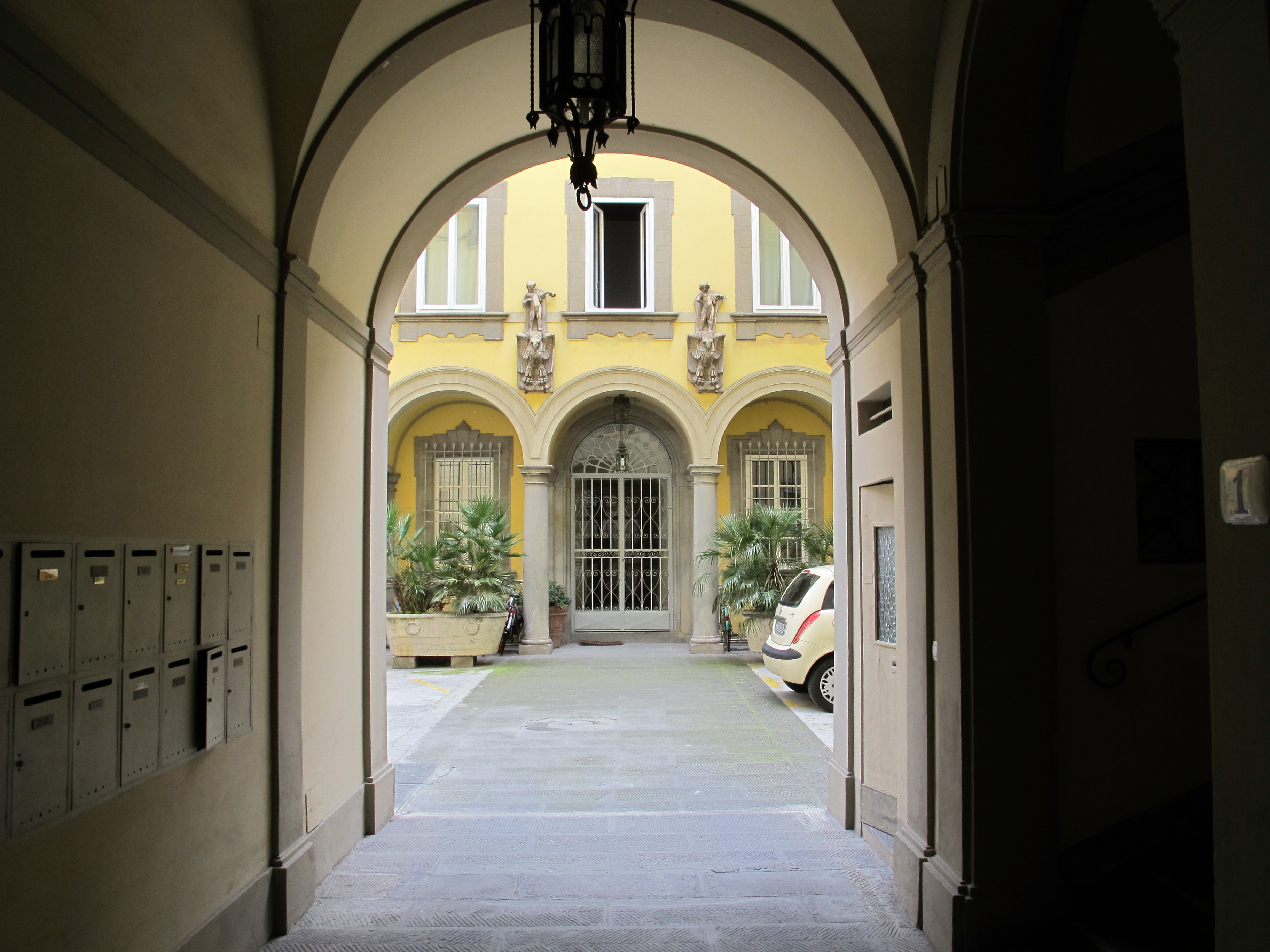 Borgo la croce 1, Palazzina Grottanelli, 05 ex- teatro alhambra